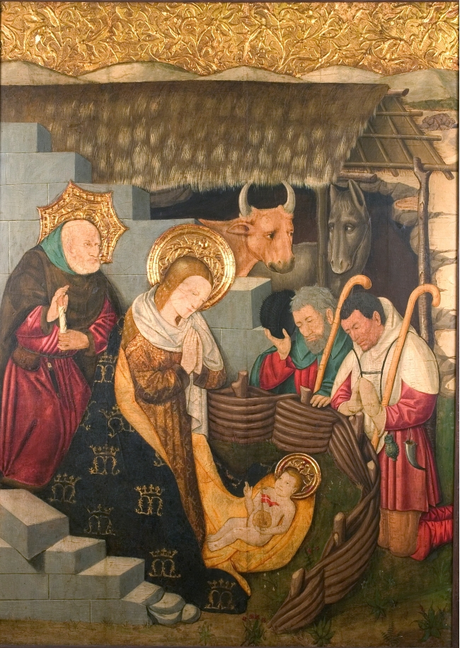 Taula de l'adoració dels pastors del retaule de Peralta de la Sal, obra de Pere Garcia de Benavarri i Jaume Ferrer II. 1450